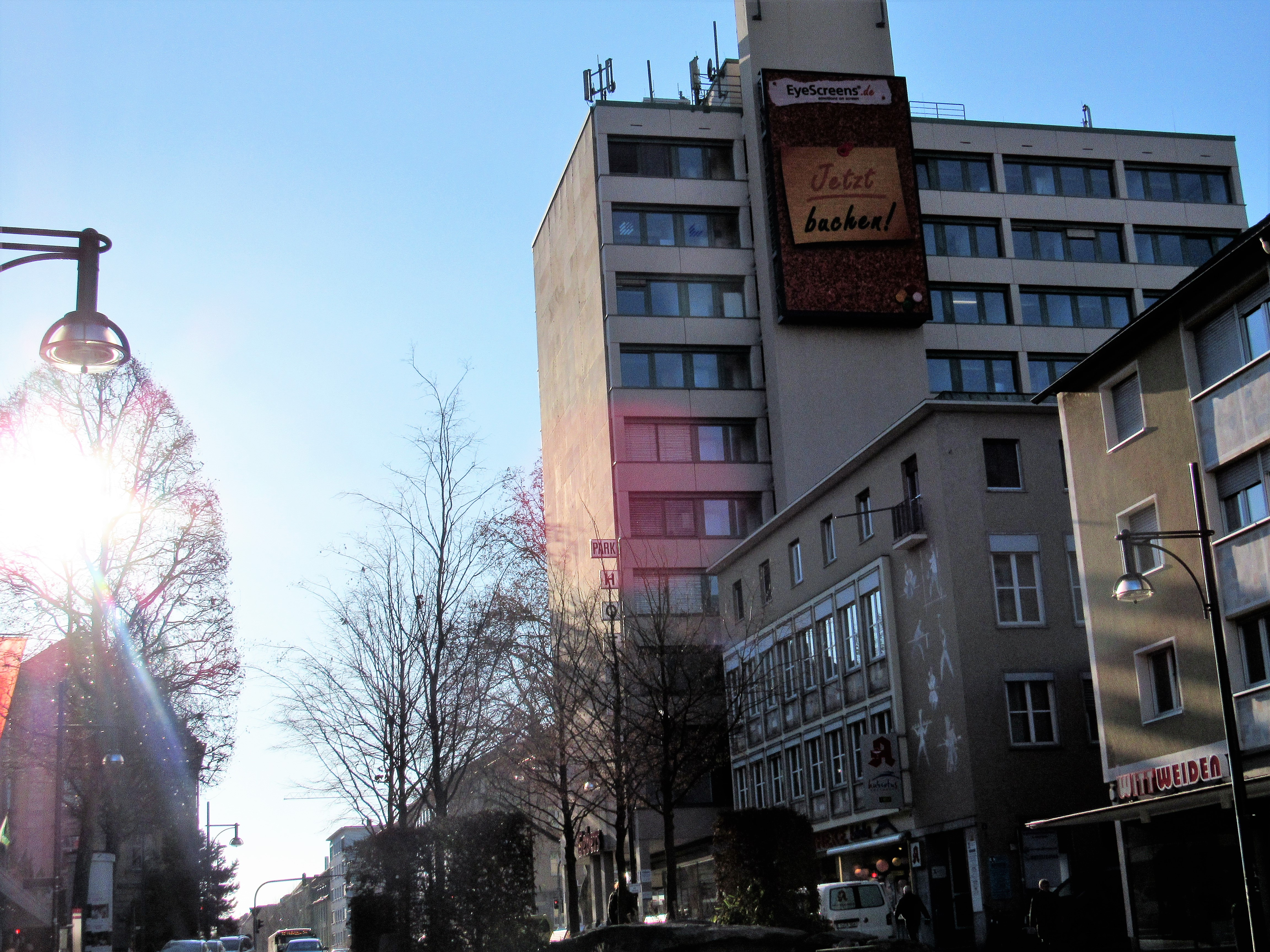 Idunahochhaus am Jägersbrunnen